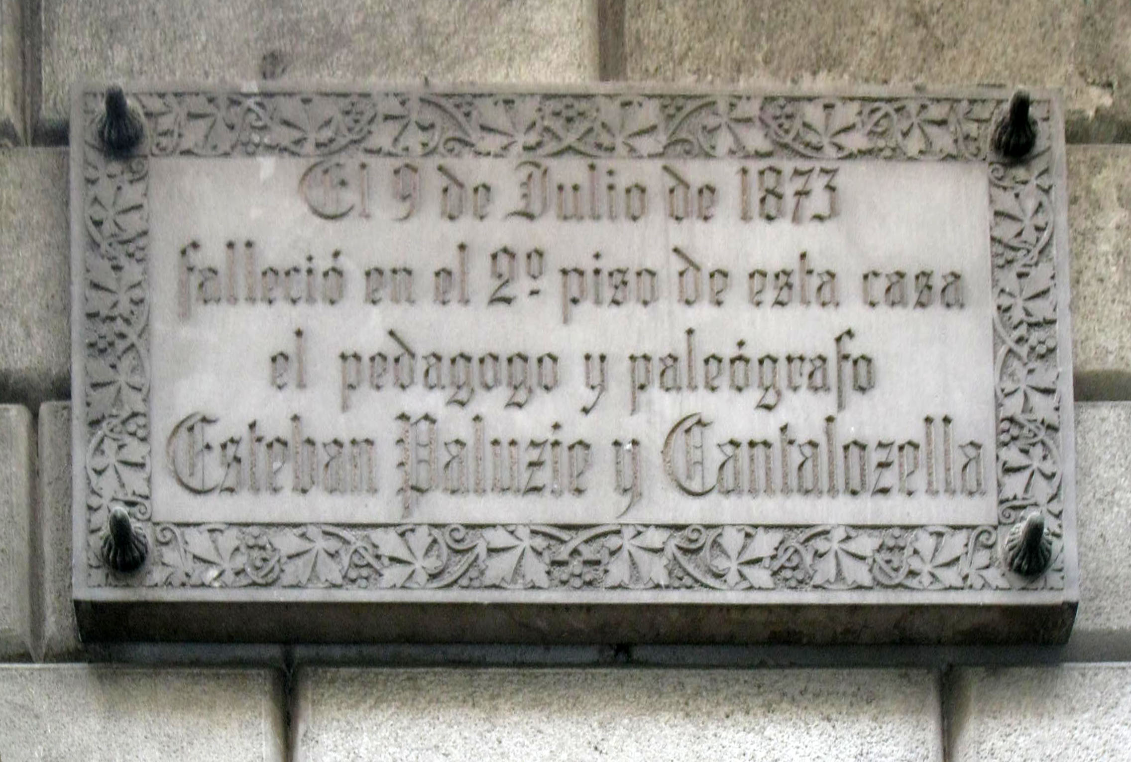 Esteban Paluzie i Cantalozella. C. Comtessa de Sobradiel, 7 (Barcelona)